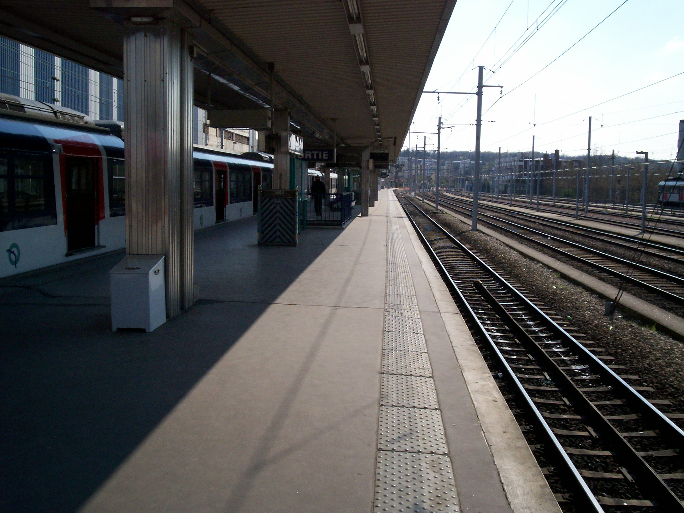 MS 61 - Gare de Boissy-Saint-Léger